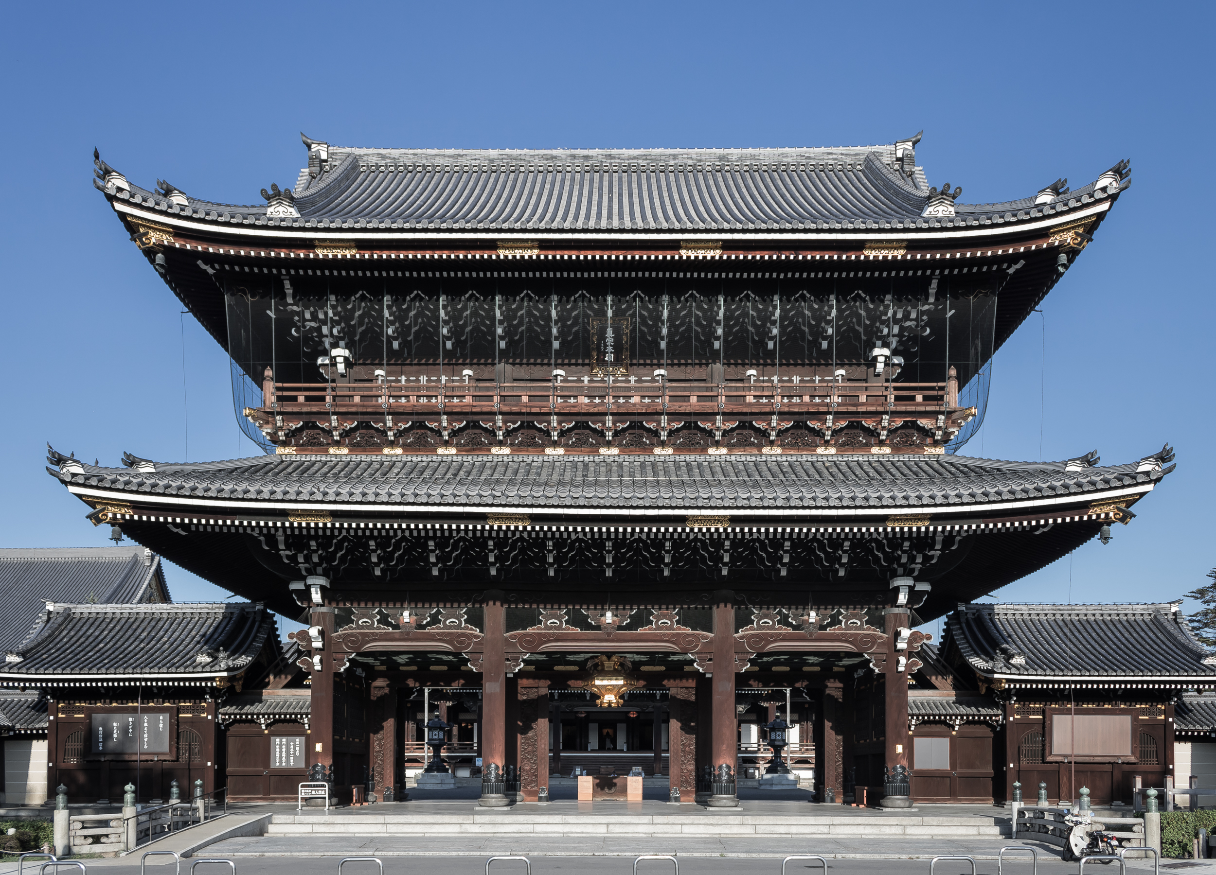 東本願寺、御影堂門。